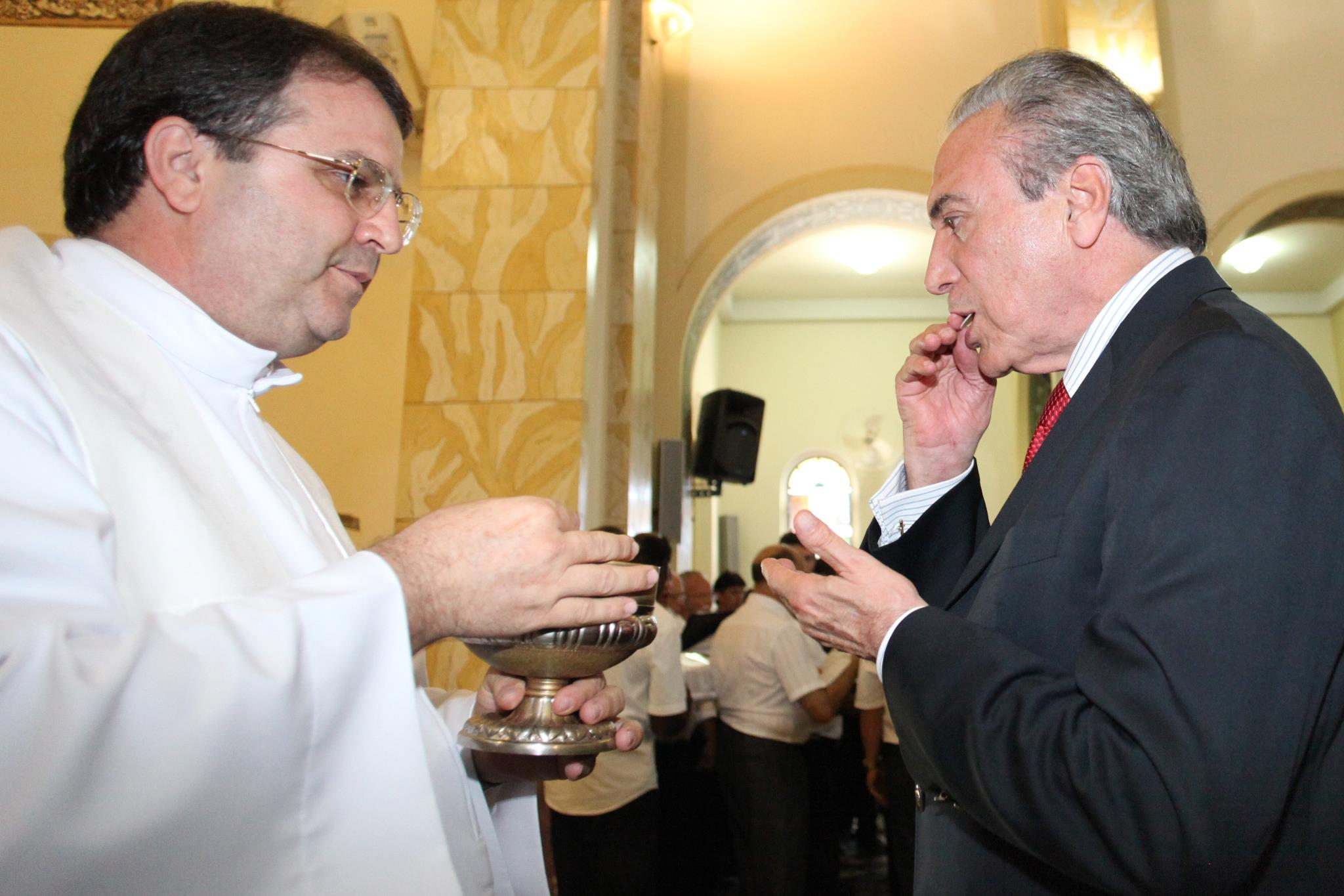 Vice-presidente Michel Temer prestigia o aniversário de 171 anos de Tietê (SP) Vice-presidente Michel Temer na Missa de Ação de Graças pelo aniversário da cidade, na Igreja Matriz.